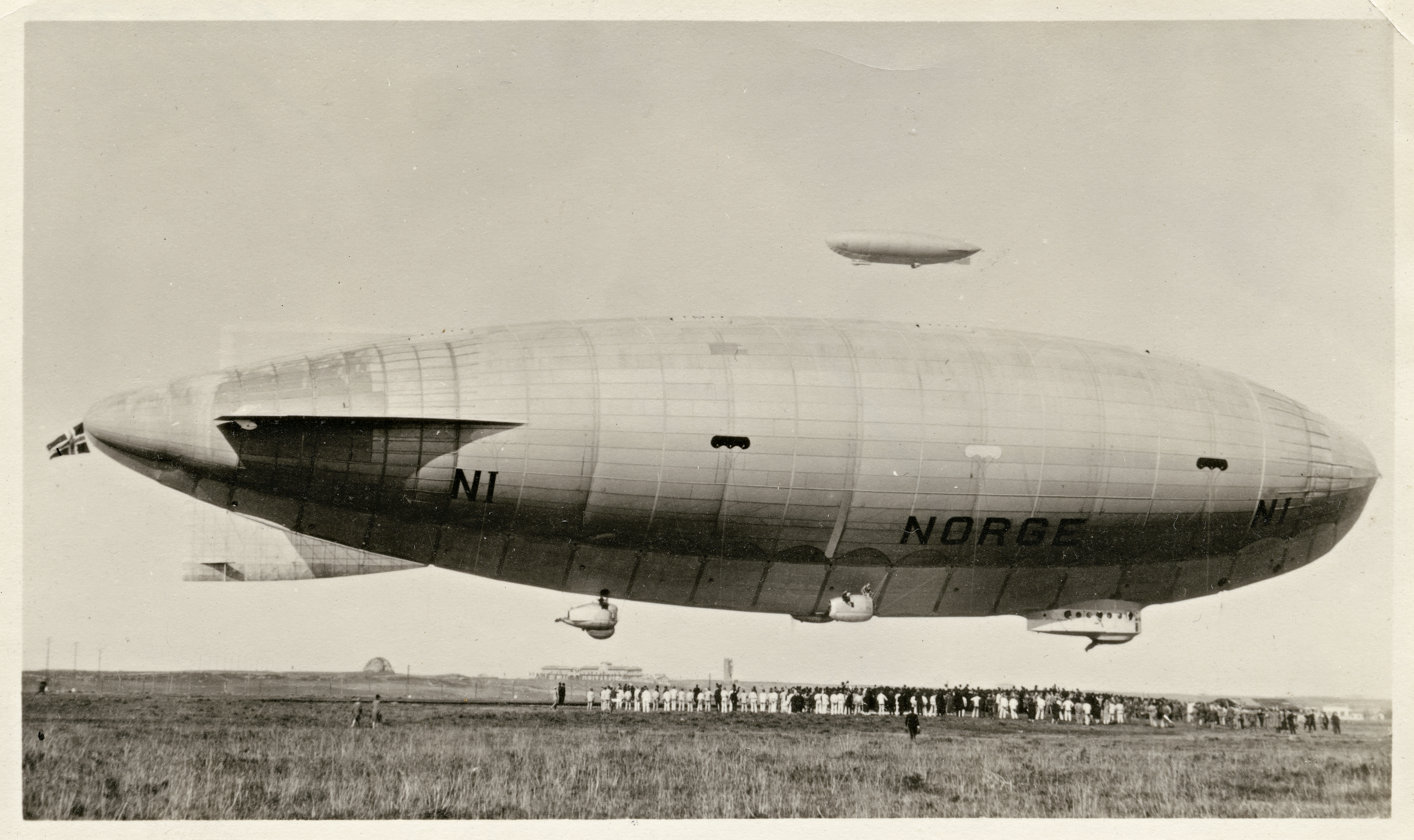 Tittel / Title: Luftskipet "Norge" like over bakken på Ciampino-flyplassen Beskrivelse / Description: Gelatin papirpositiv. Dato / Date: mars 1926 Fotograf / Photographer: ukjent / unknown Sted / Place: Italia, Roma, Ciampino Eier / Owner Institution: Nasjonalbiblioteket / National Library of Norway Lenke / Link: Bildesignatur / Image Number: bldsa_NPRA0720